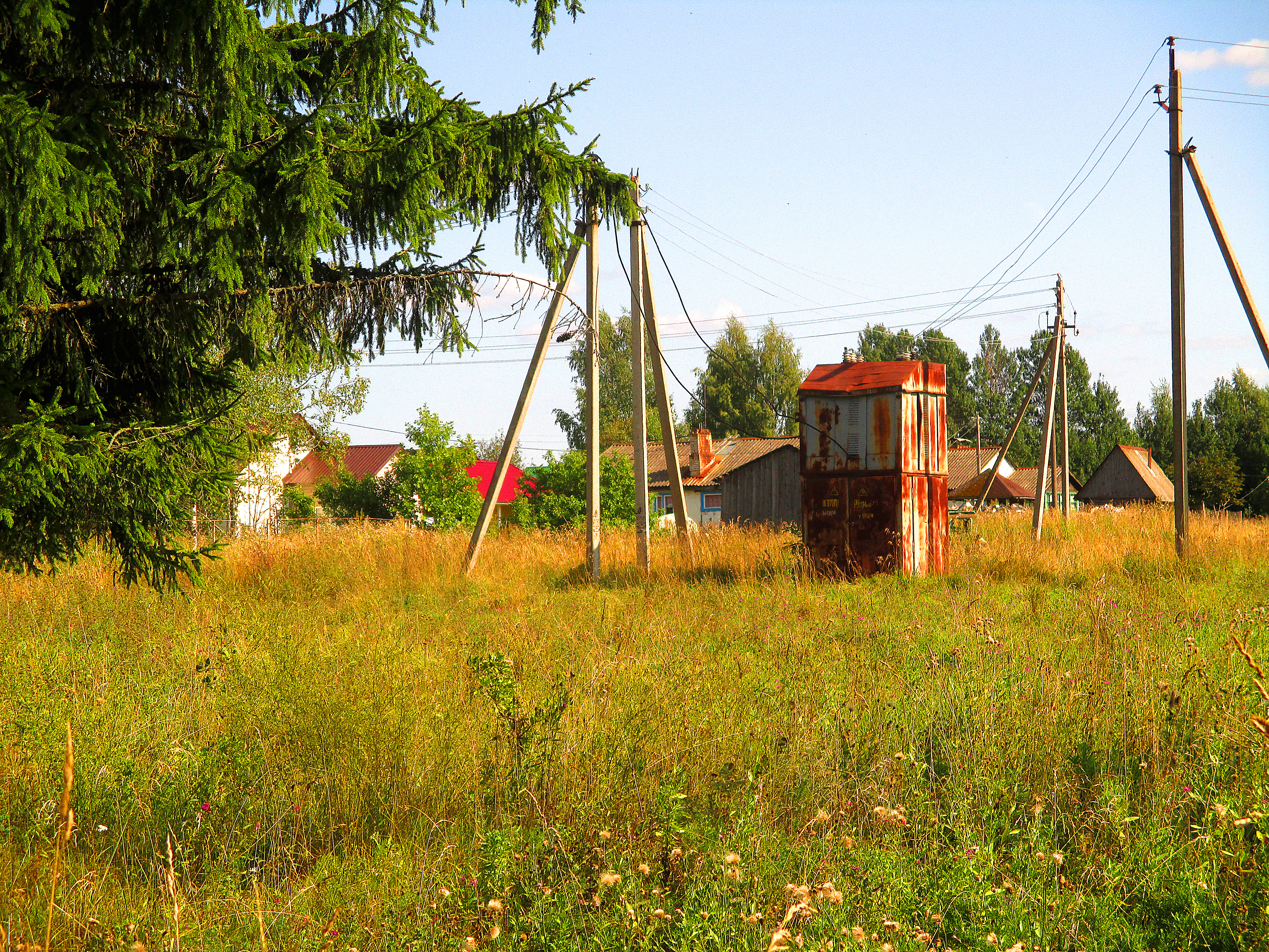 Трансформаторная подстанция в деревне Володарское